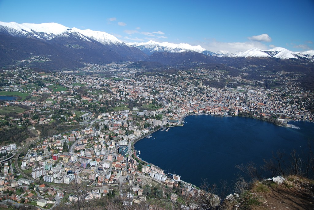 Lugano, aerial view